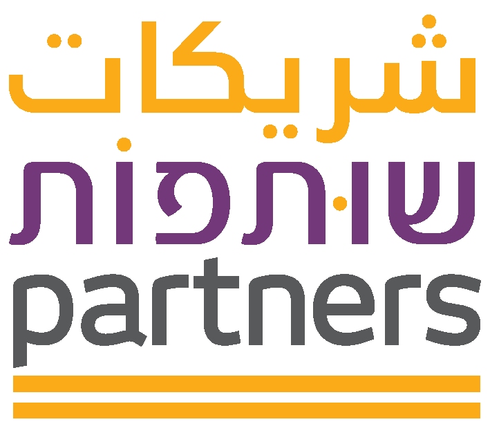 לוגו קואליציית שותפות בערבית, עברית ואנגלית